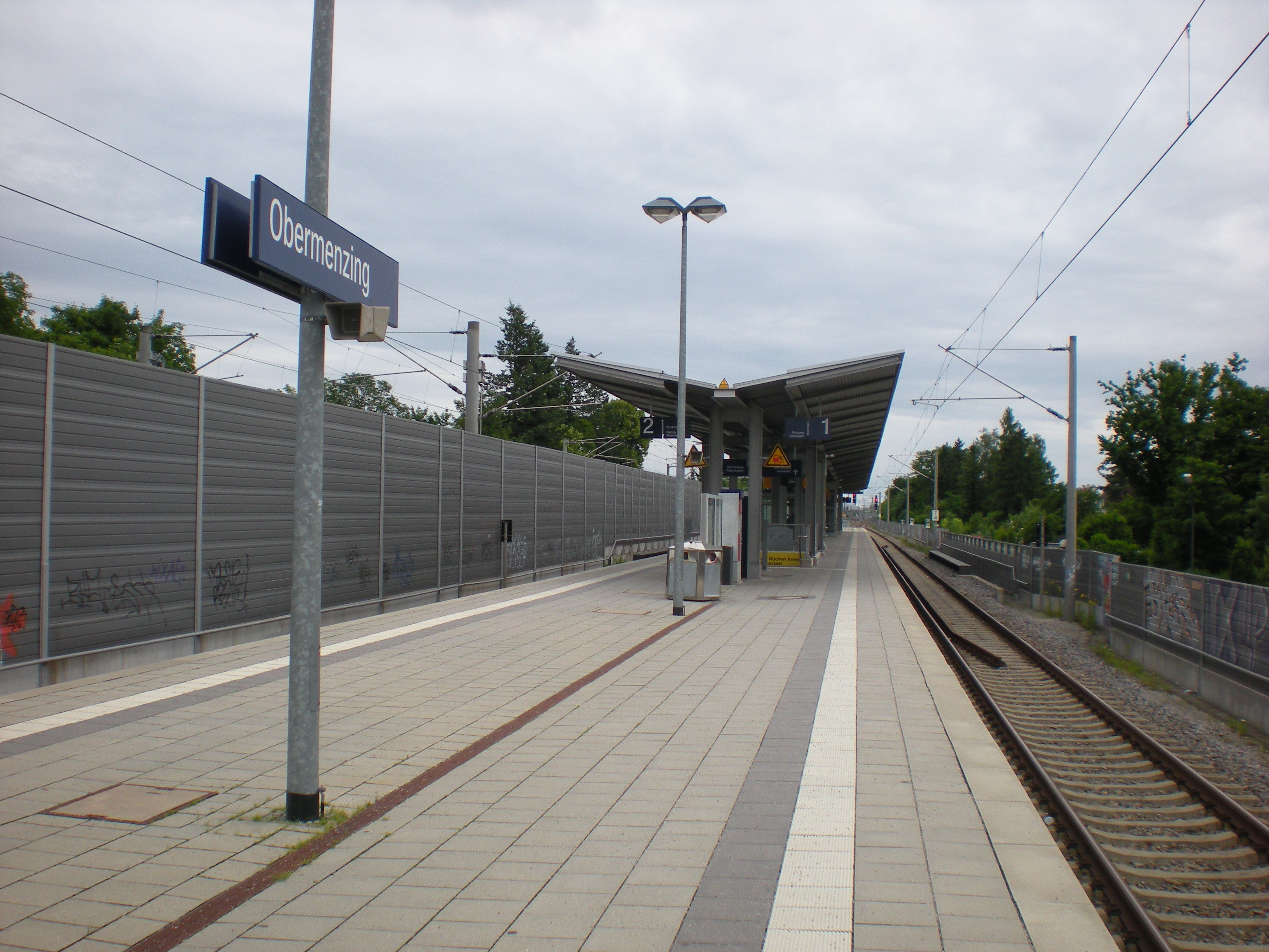 Bahnsteig des S-Bahnhofs München-Obermenzing